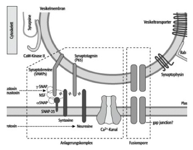 der Exocytose-Vorgang wird über die Membran- und Vesikelproteine induziert